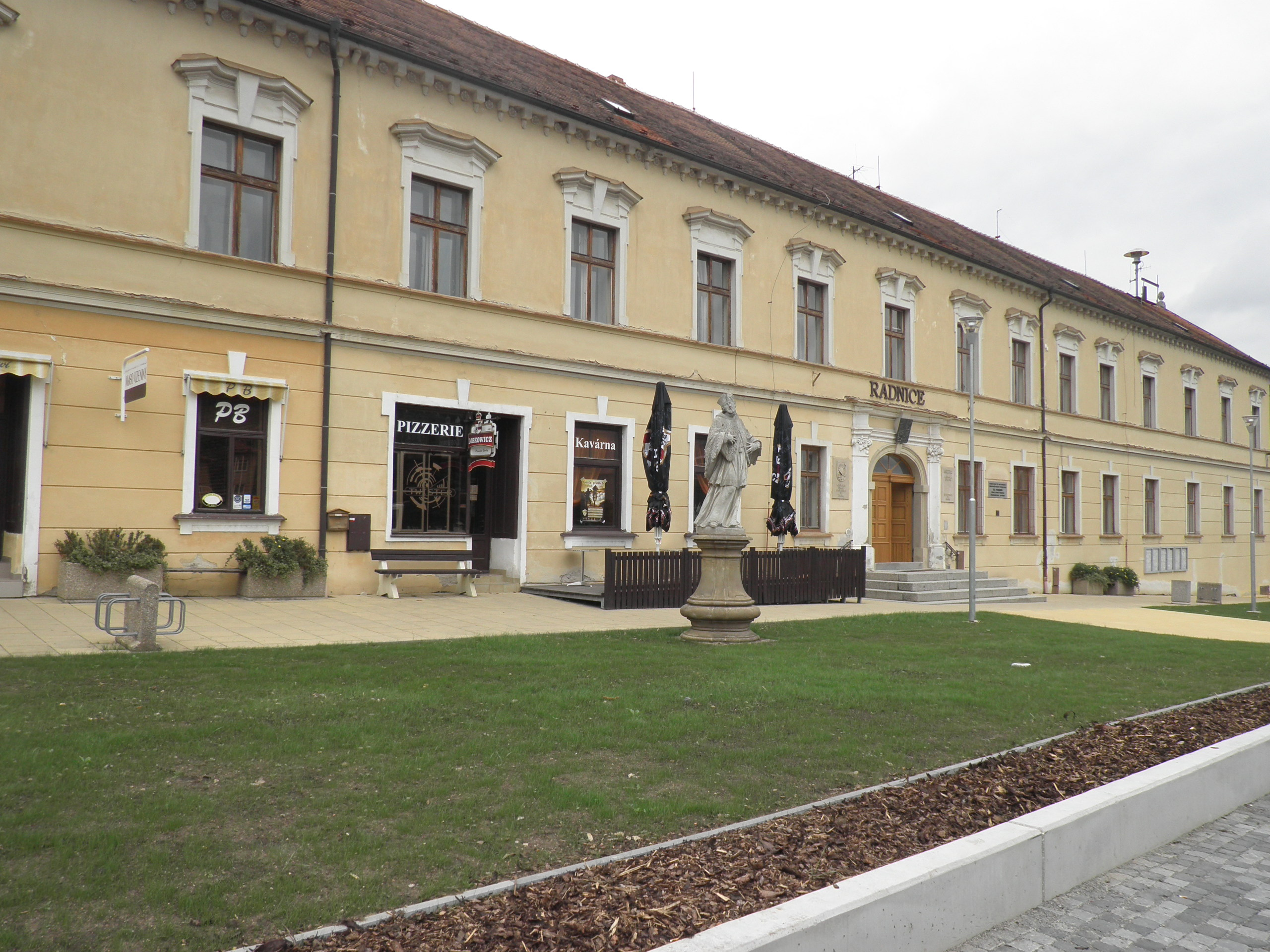 Zámek Klobouky u Brna, nám. Míru 169, Klobouky u Brna